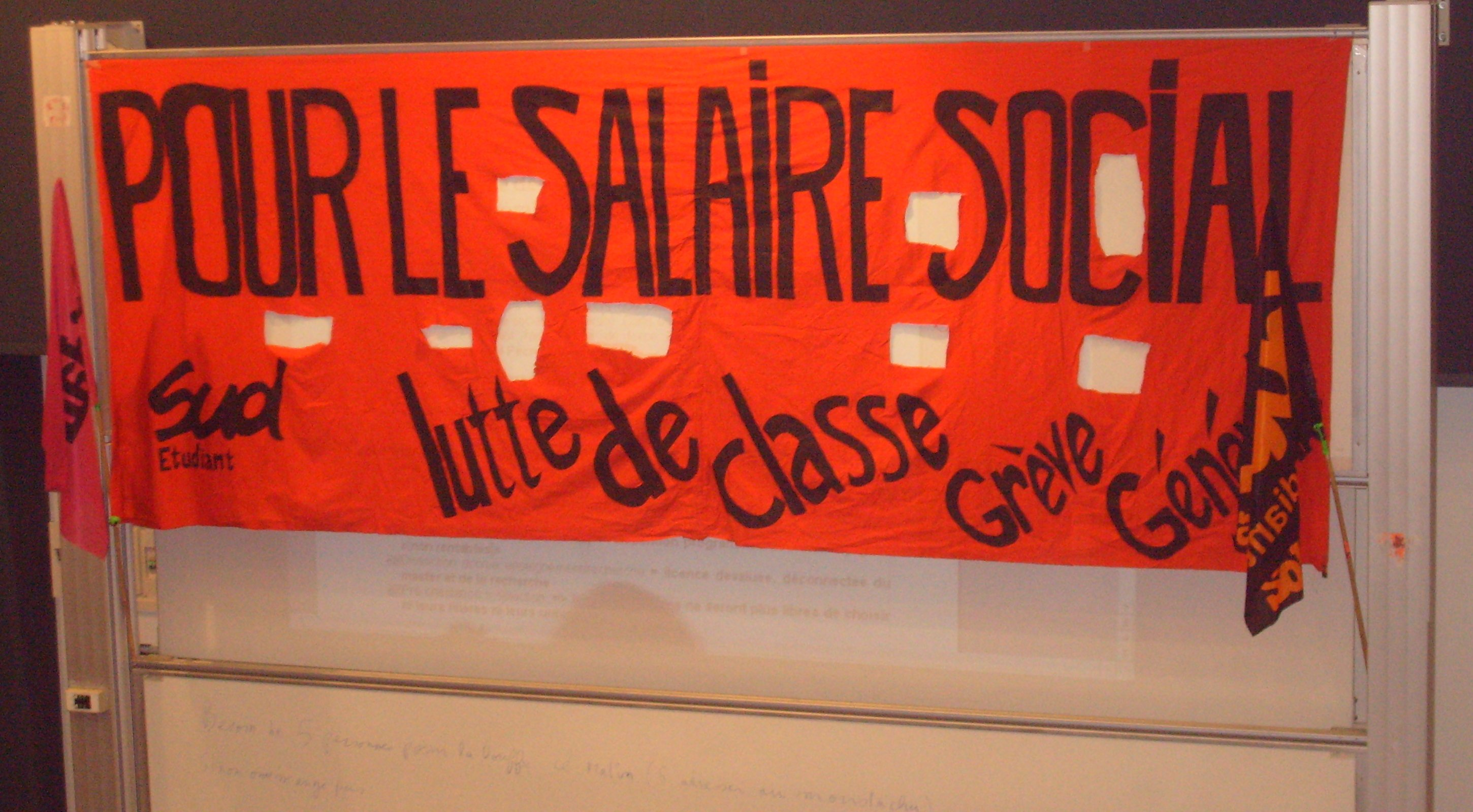 Banderole pour le salaire social, Ve Congrès de la fédération SUD Étudiant, Le Havre 2007 Copyright © 2007 Sylvain Terrien